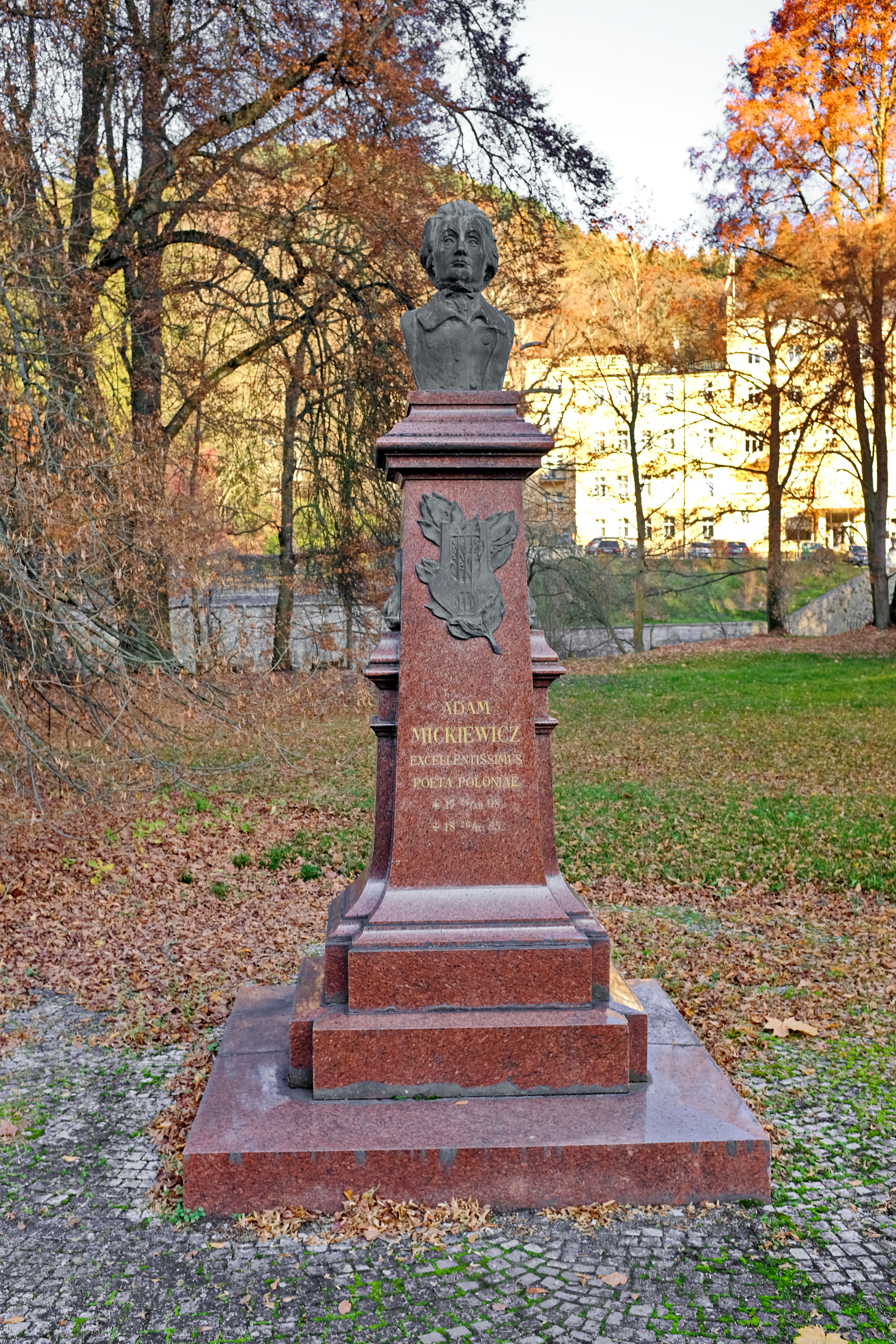 Busta Adama Mickiewicze, v parku, u Mickiewiczova mostu, parc. 790, Karlovy Vary.